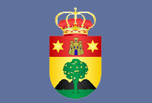 Bandera de Pineda Trasmonte (Burgos, España)